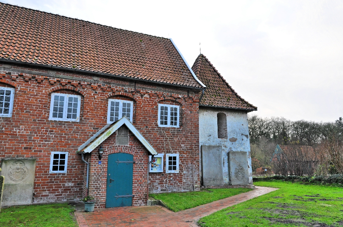 Neuenwalde 2012